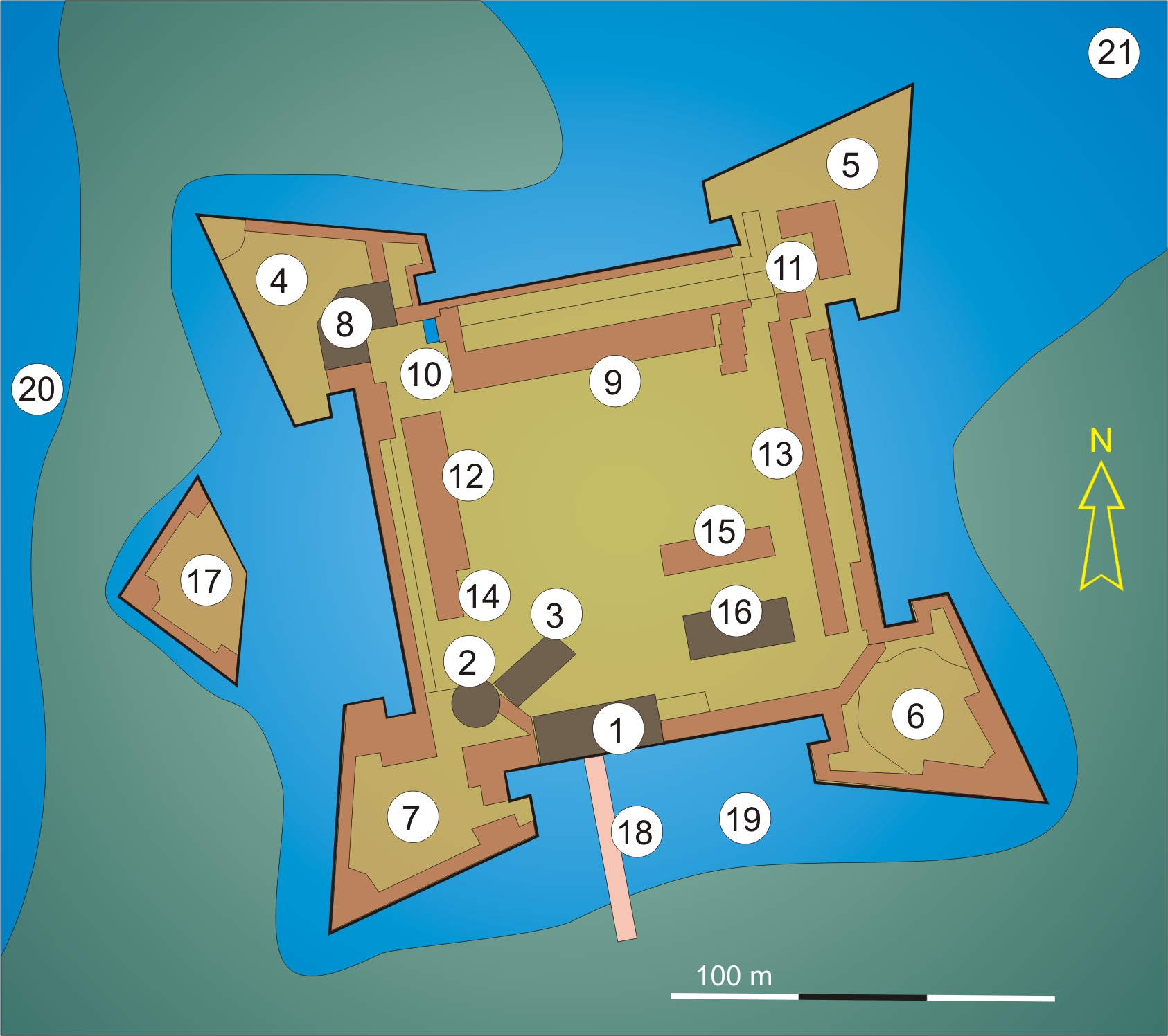 Karte Spandauer Zitadelle - selbst erstellt Jan. 2006 - GNU-FDL Legende: 1 Torhaus, heute Gaststätte, Museum 2 Juliusturm, heute Museum 3 Palas, heute Museum 4 Bastion Kronprinz 5 Bastion Brandenburg 6 Bastion Königin 7 Bastion König 8 Kanonenturm 9 ehemalige Kaserne, heute Konferenzzentrum 10 Wassertor, "Hafen" 11 italienische Höfe 12 ehemaliges Verwaltungsgebäude, heute Kunsthandwerker 13 Magazin 14 ehemaliges Offiziershaus 15 ehemaliger Exerzierschuppen, heute Waffensammlung 16 ehemaliges Zeughaus, heute Stadtmuseum 17 Ravelin "Schweinekopf" 18 Damm und Brücke 19 Wassergraben 20 Havel, Havelschleuse 21 Spandauer See